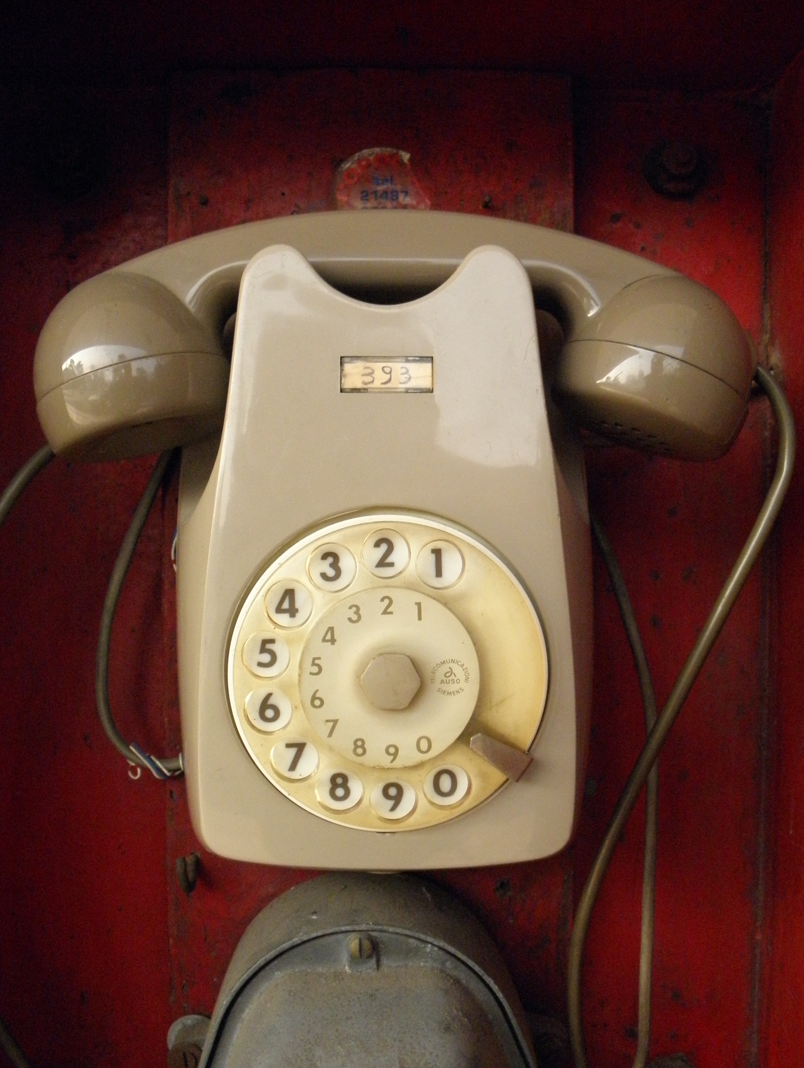 Un telefono tipo S62 unificato da parete di produzione Siemens Auso, postazione taxi alla stazione ferroviaria di Rovigo.